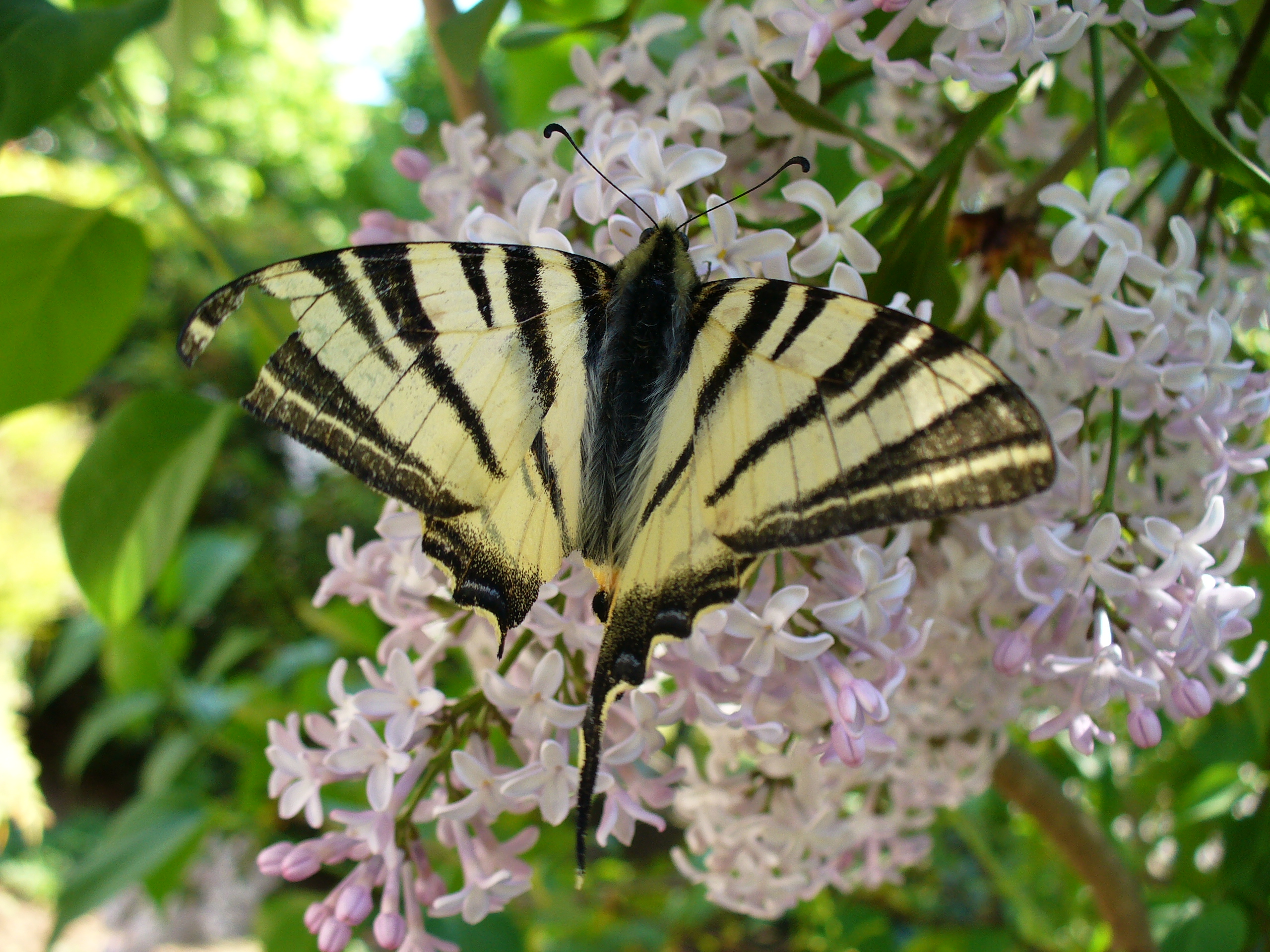 Iphiclides podalirius